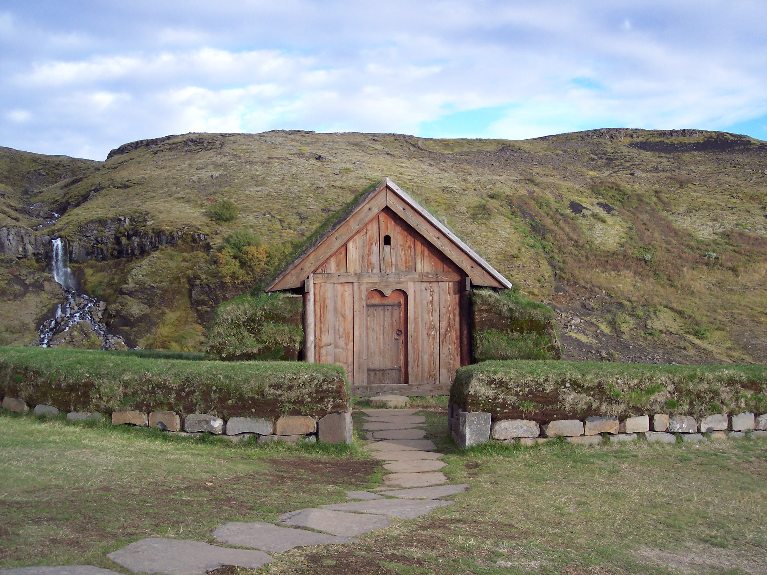 Skeljastaðakirkja, Iceland í Þjórsárdalur